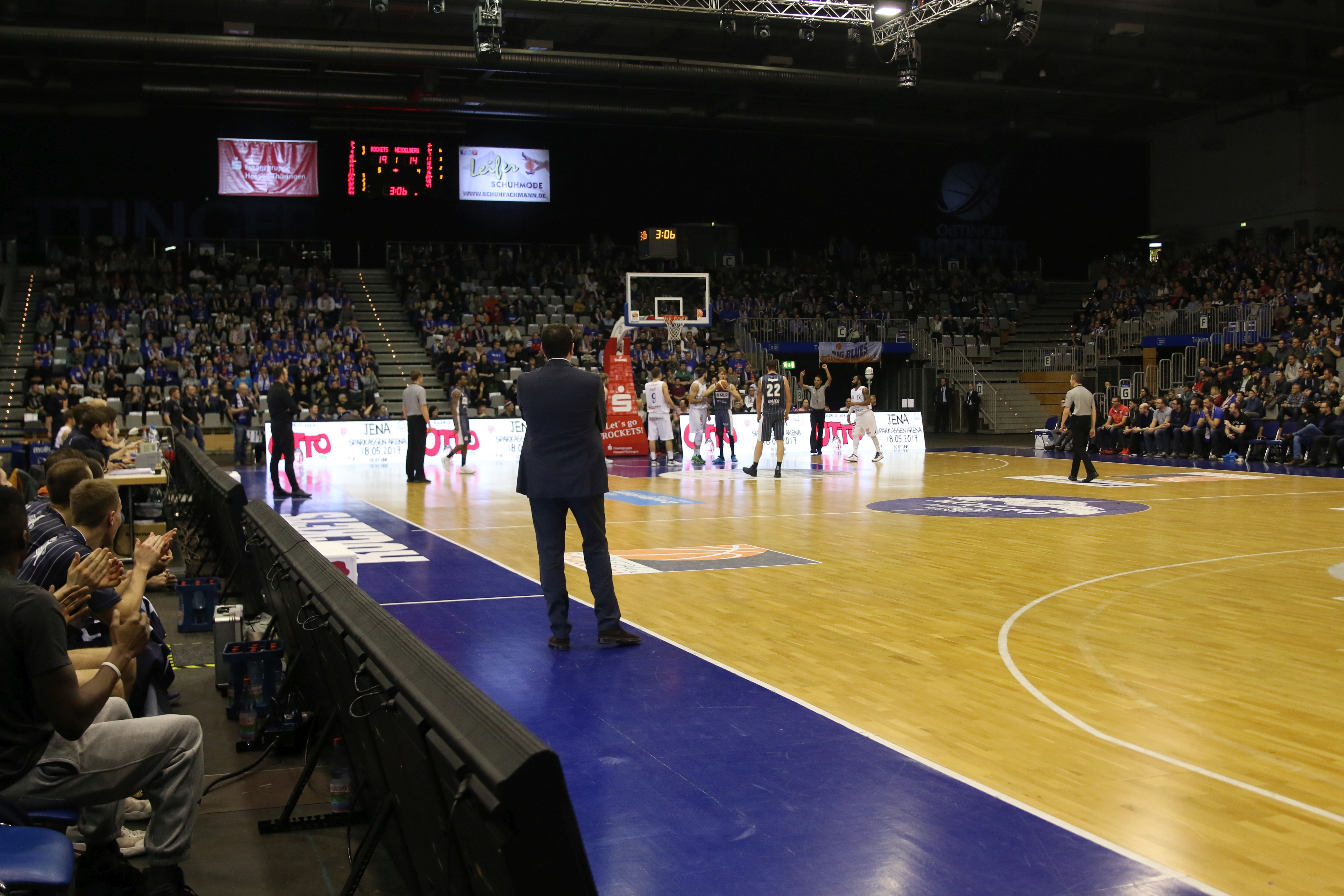 2. Basketball-Bundesliga (21. Spieltag; 2. Februar 2017; Game-ID: 102913)